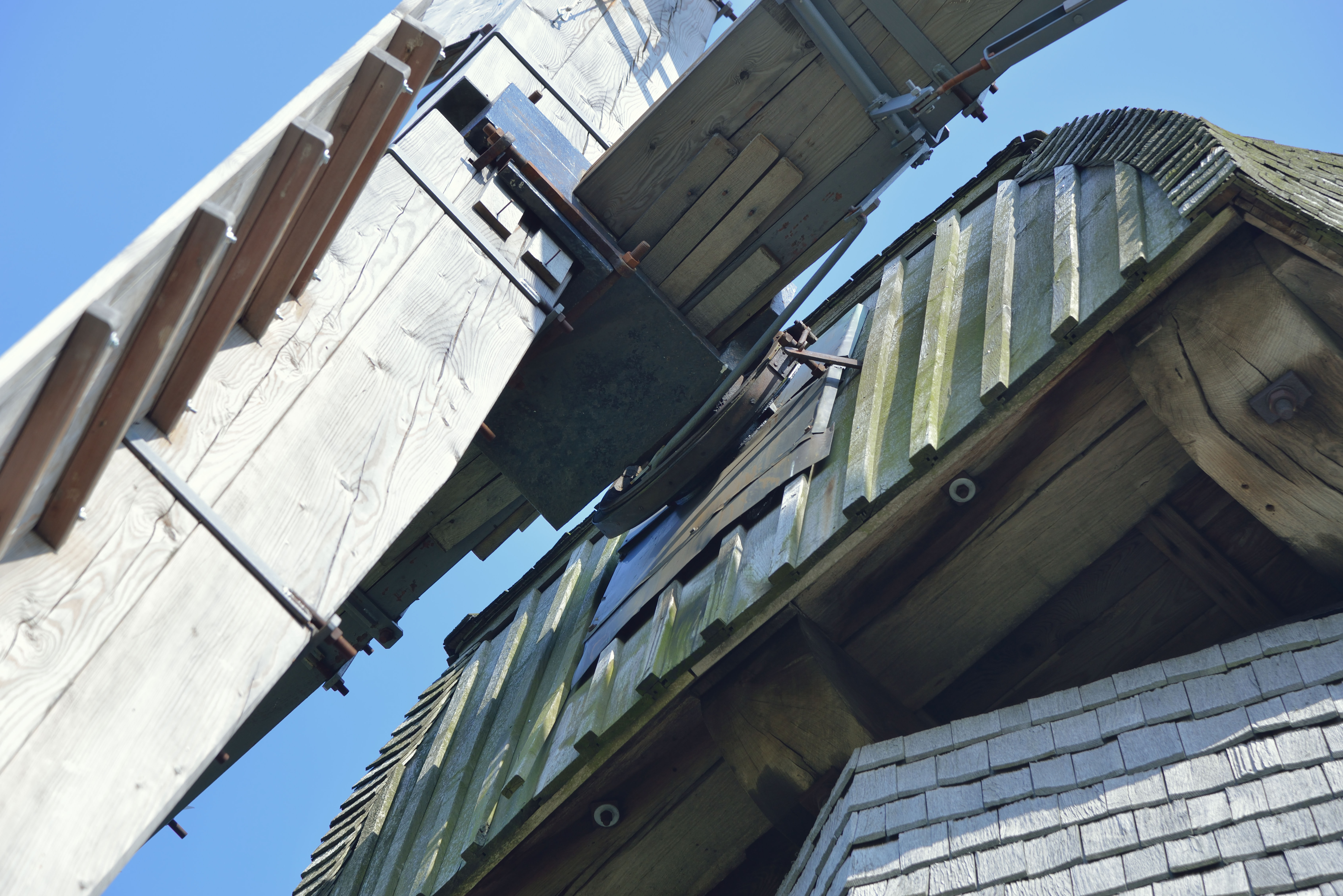 Windmühle Messlingen, Duitsland, om de askop de bediening voor de zelfzwichting